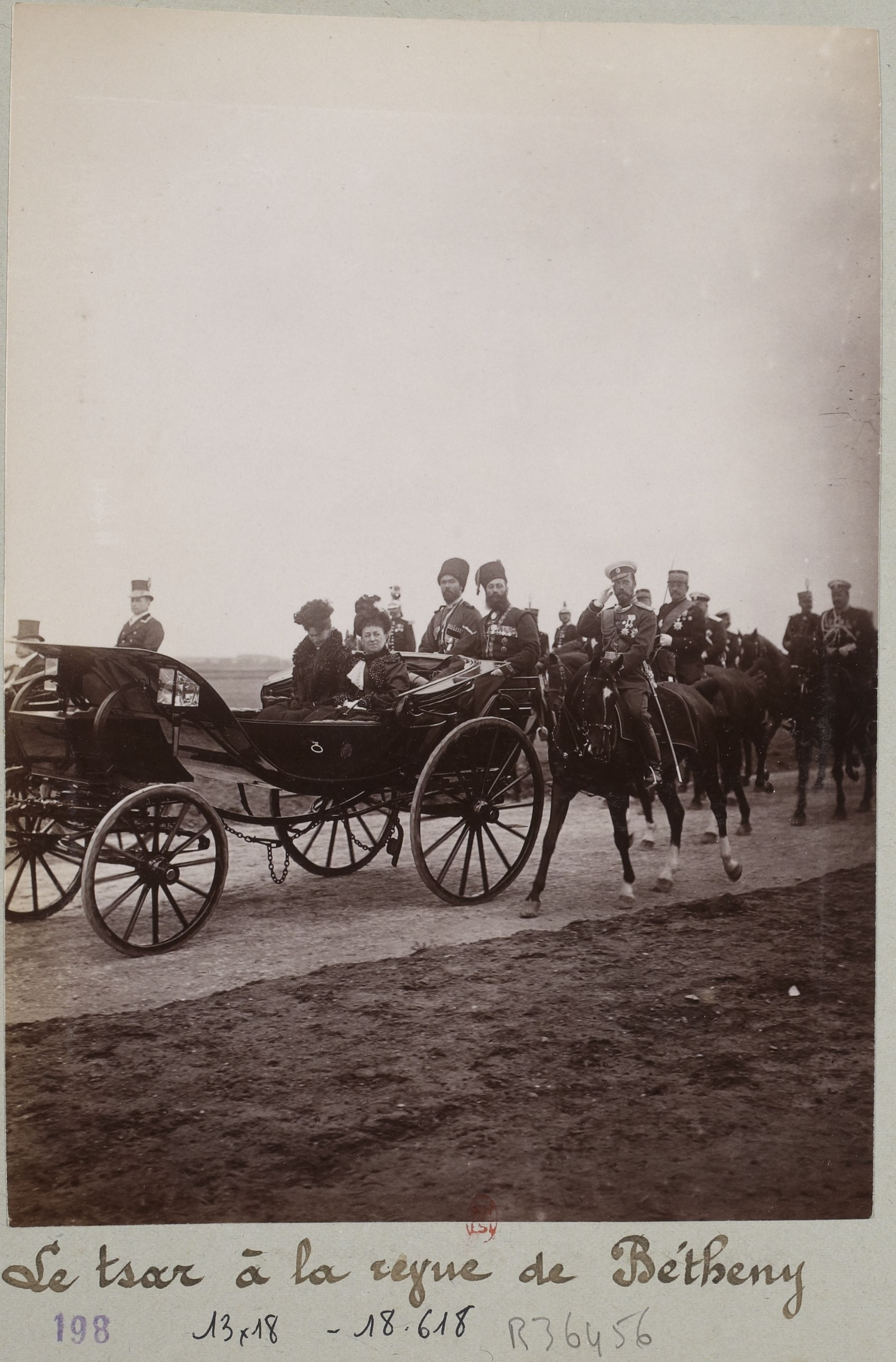 [Collection Jules Beau. Photographie sportive] : T. 14. Année 1901 / Jules Beau : F. 44. Tzar à la revue de Bétheny ; ébarbeuse de pavés de bois